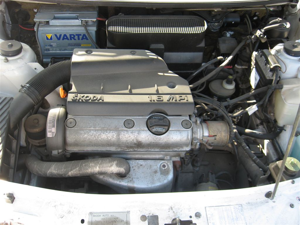 Skoda Felicia 1,6 Motorja